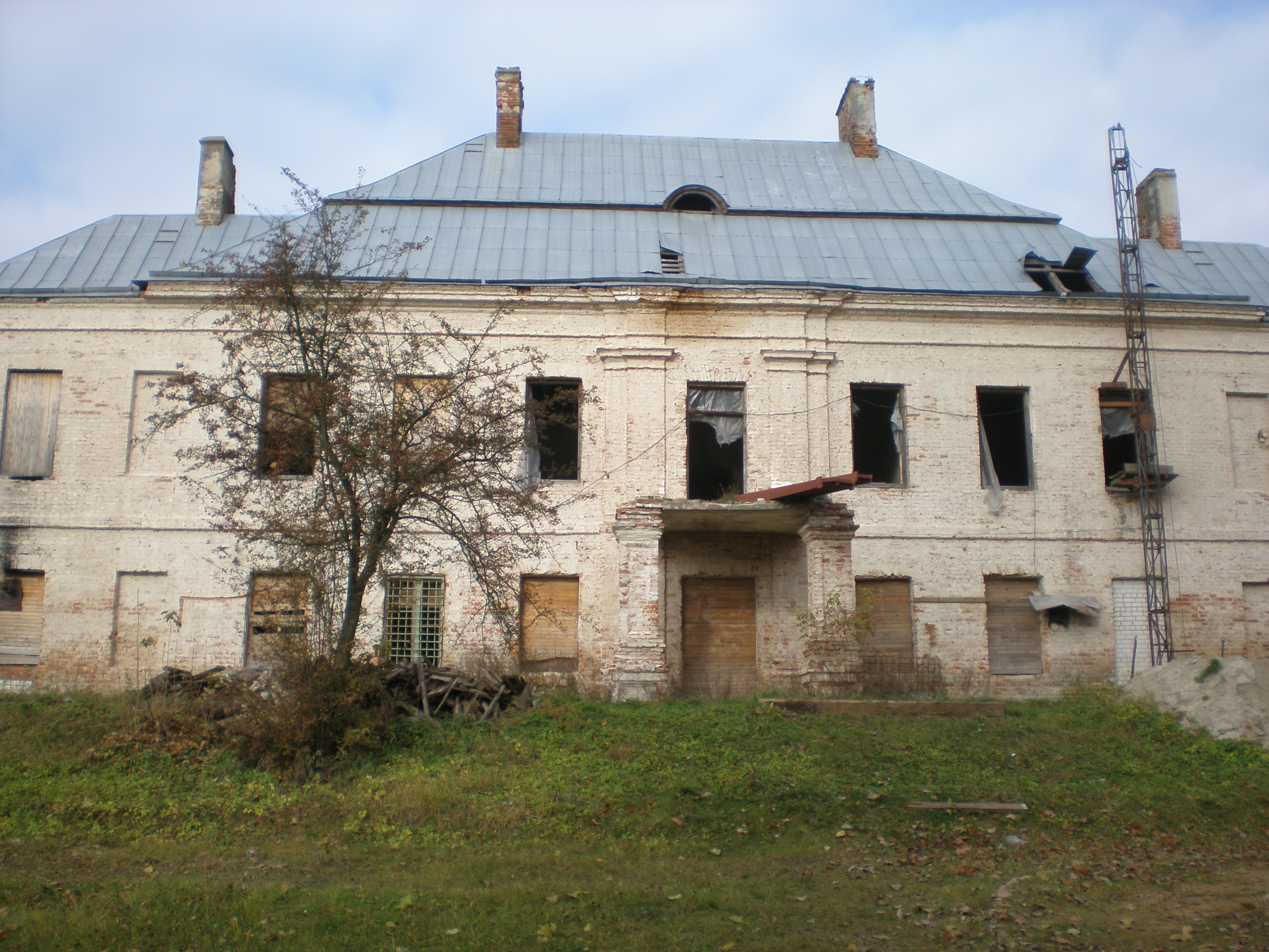 Беларуская (тарашкевіца): Былая сядзіба Нямцэвічаў:сядзібны дом. в. Скокі This is a photo of Belarusian heritage monument. Reference number: 112Г000110 ( WLM)